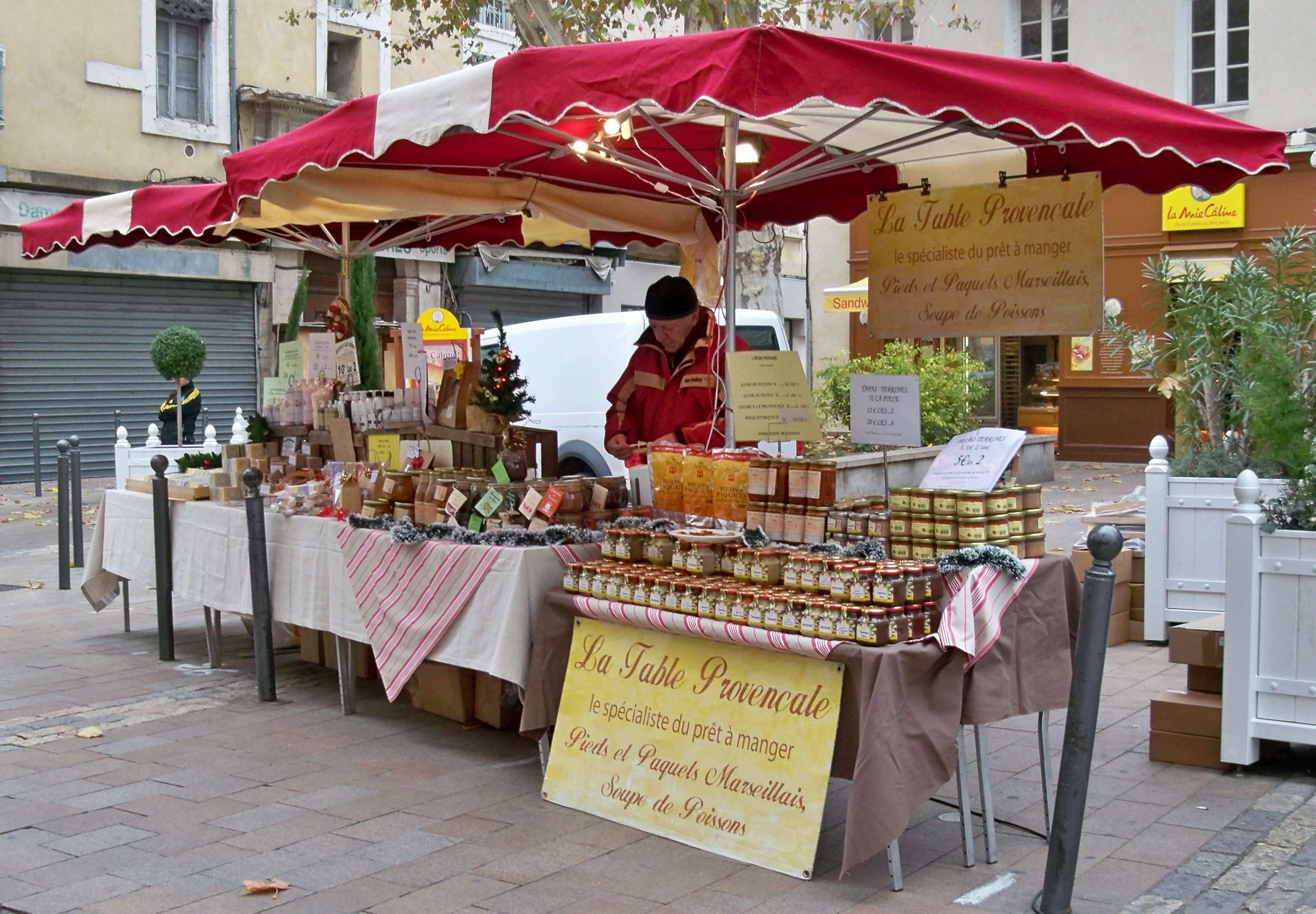 Stand à la Foire de Saint Siffrein, Carpentras, France